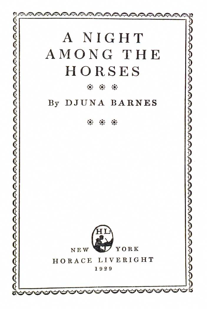 Djuna Barnes A Night Among the Horses 1929 title